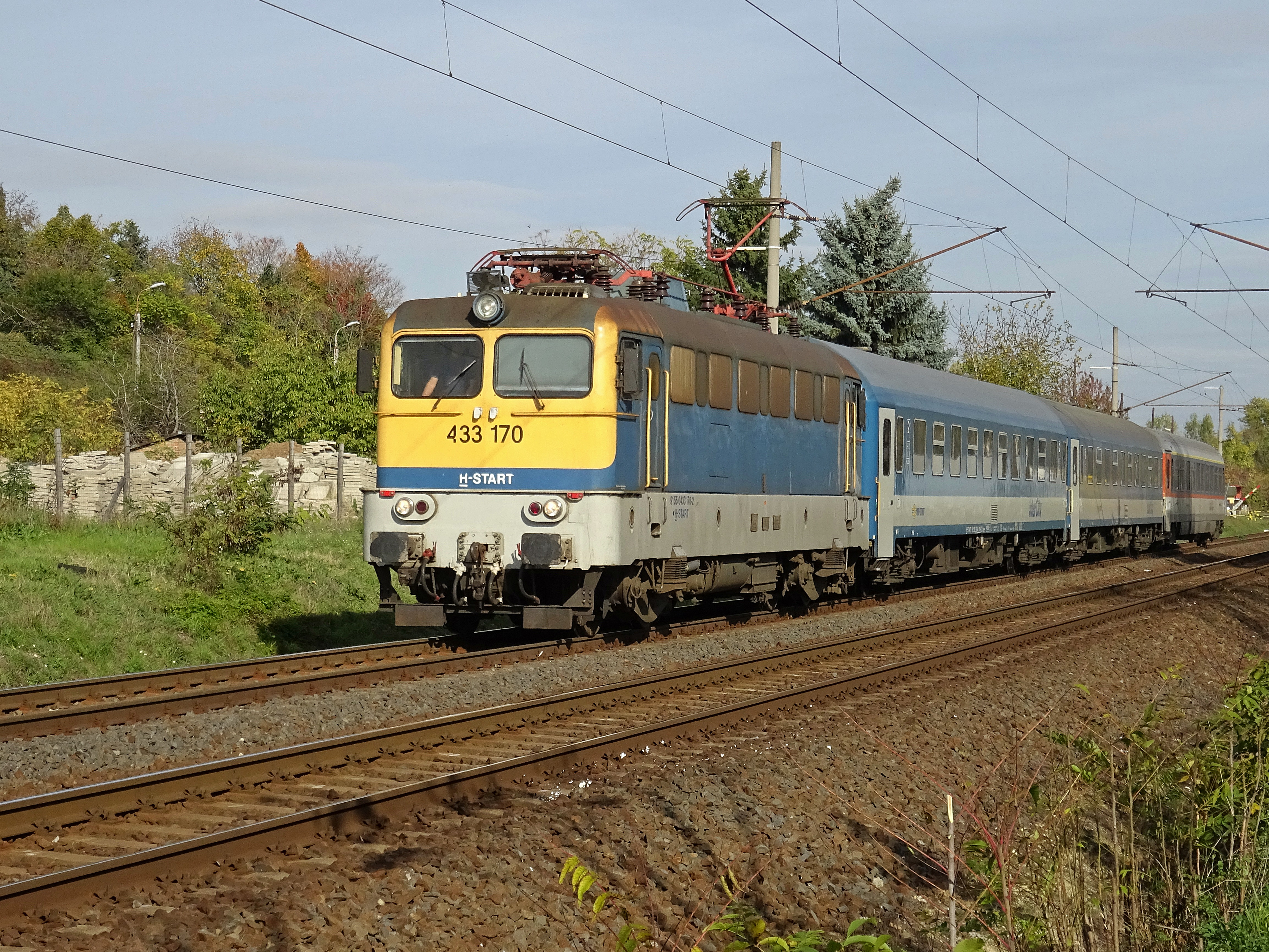 A 433 170-es pályaszámú gép a Tenkes InterCity-vel Pécs felé Budatéténynél 2017. október 25-én.